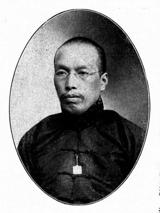 中文（台灣）: 中華民國國會議員